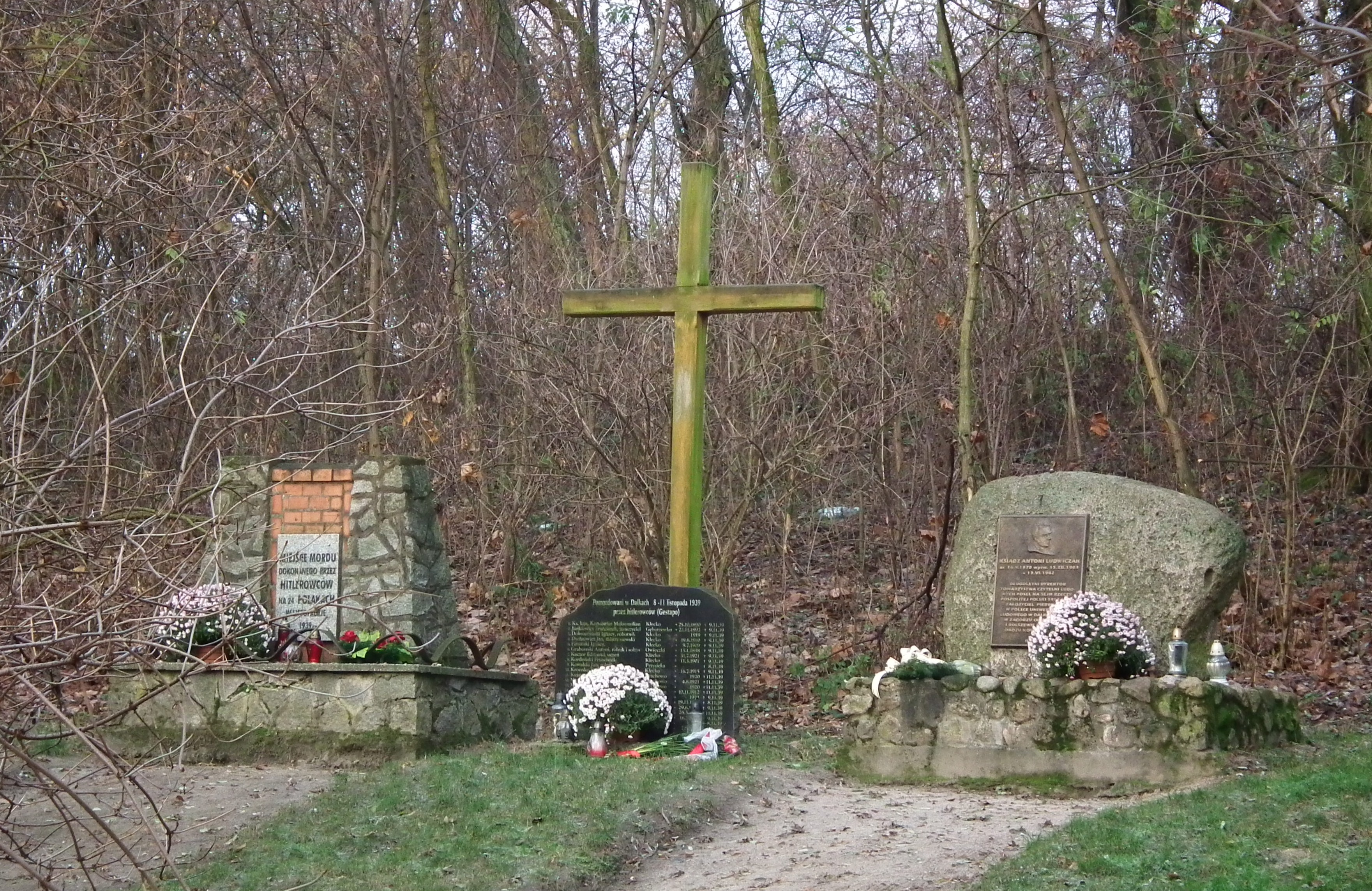 Miejsce Pamięci Narodowej w Gnieźnie, na Dalkach.